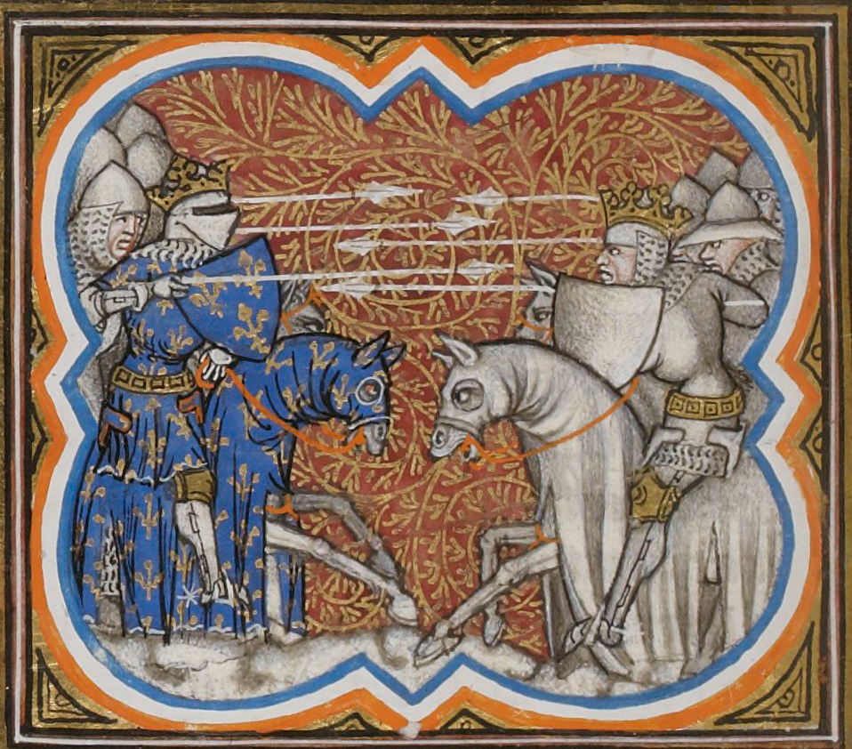 Ludvík VI. Francouzský a Jindřich I. Anglický v bitvě u Brémule